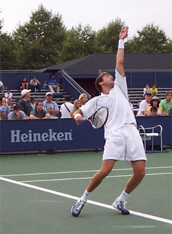 self made photo